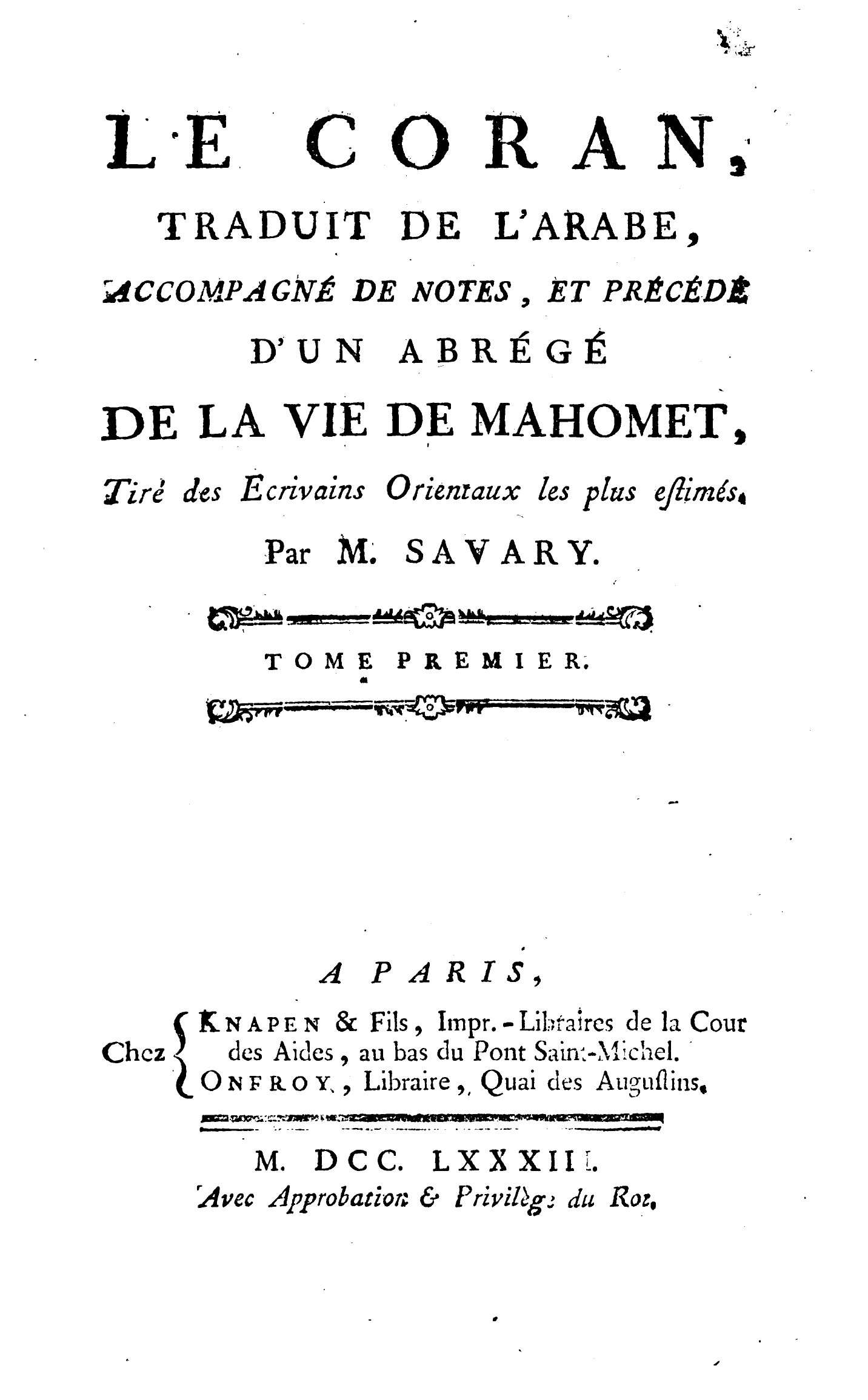 Page de titre de la première édition (1783) de la traduction du Coran par Claude-Etienne Savary